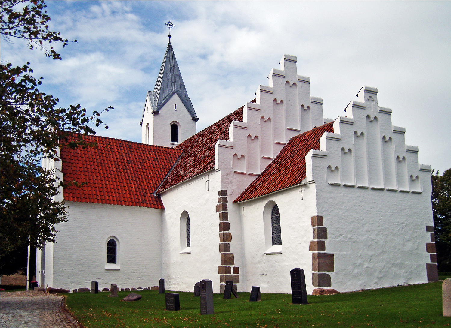 fra sydøst